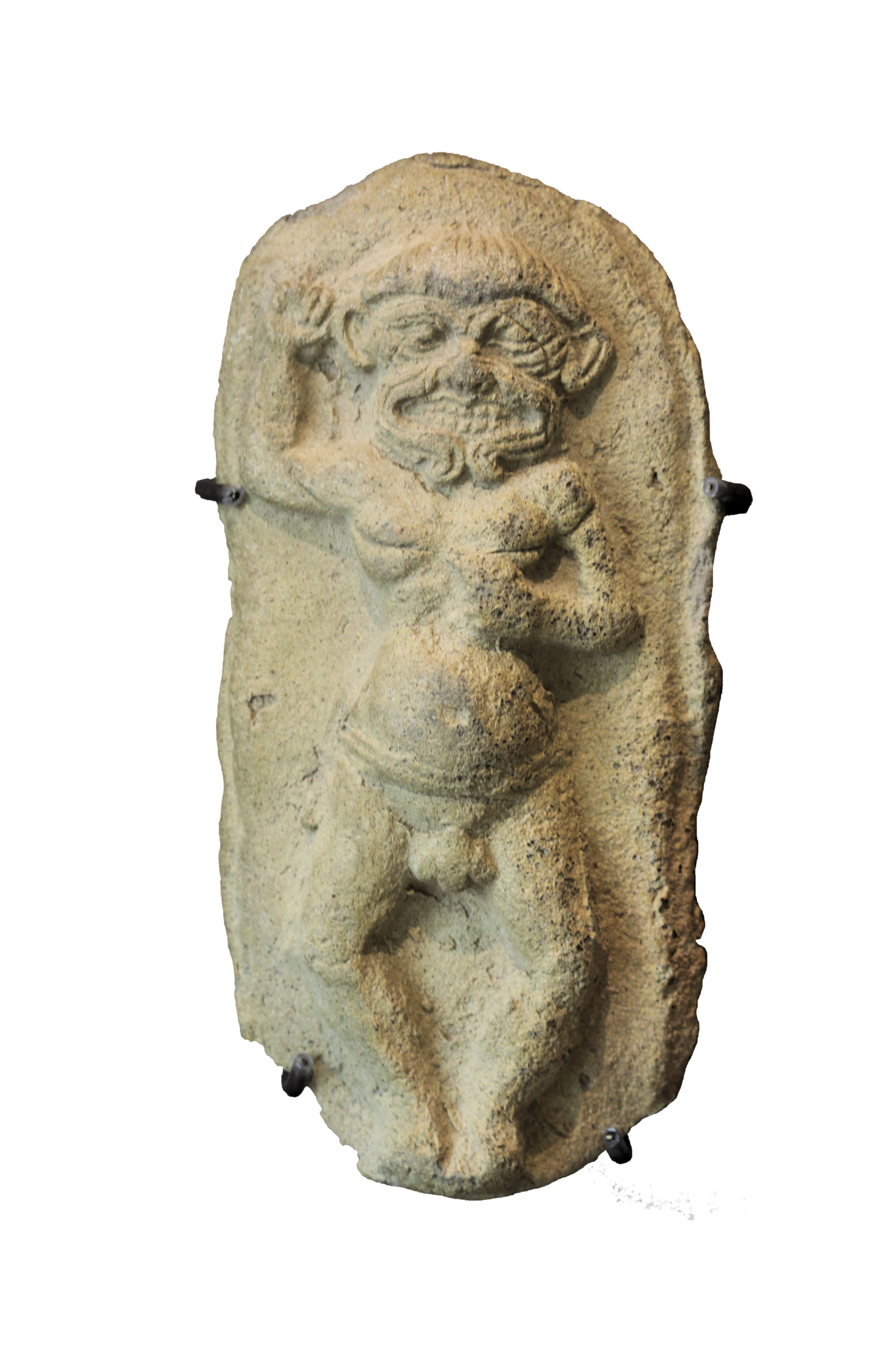 Humbaba